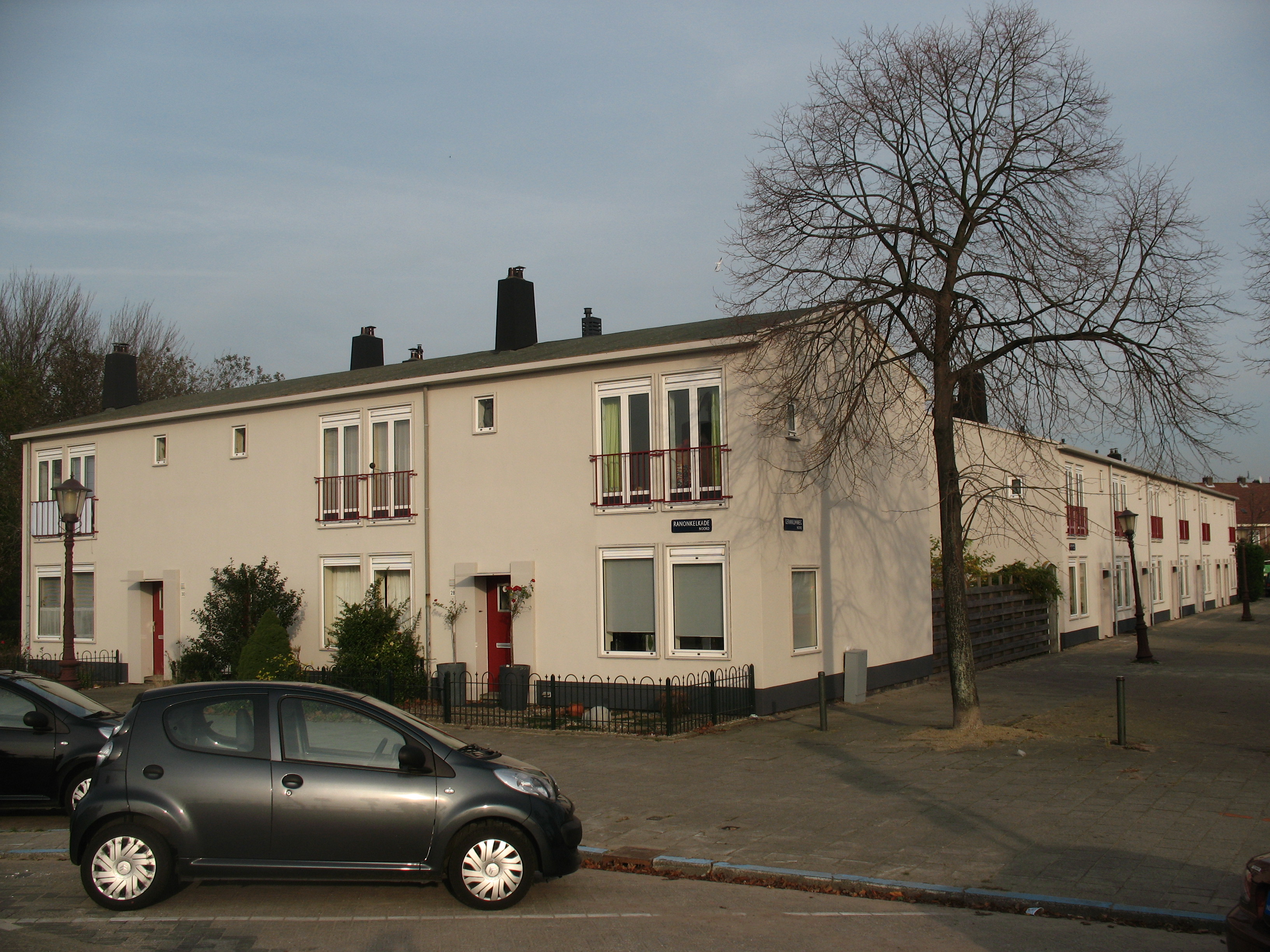 Airey-woningen volgens het Airey systeemmontagebouw uit 1949 in de polder Buiksloterham, Amsterdam-Noord. Van der Pekbuurt, Ranonkelkade. Ontworpen door architect Berghoef.